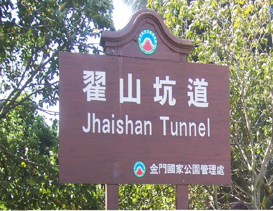 翟山坑道 招牌